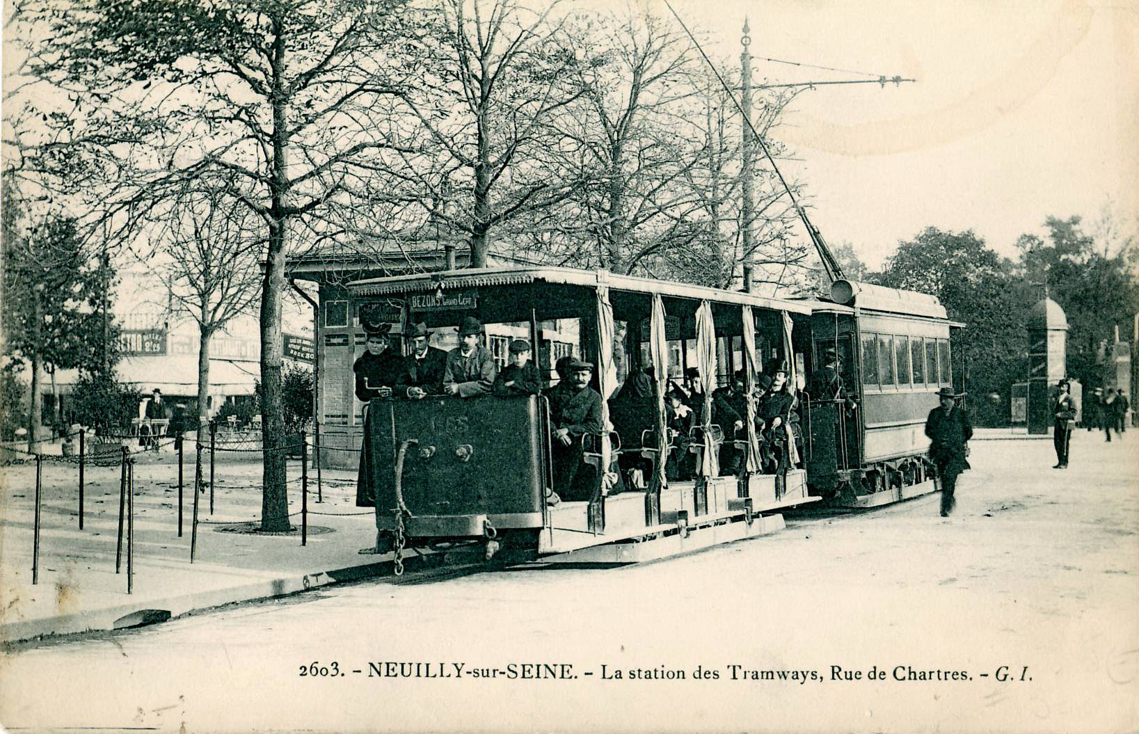 Carte posatale ancienne éditée par GI, N°2603Neuilly : La station des tramways, rue de ChârtresNoter le tramway électrique pour Bezons Grand Cerf, avec sa remorque dite « baladeuse » manifestement appréciée en ce début de printemps d'avant la Première Guerre mondiale